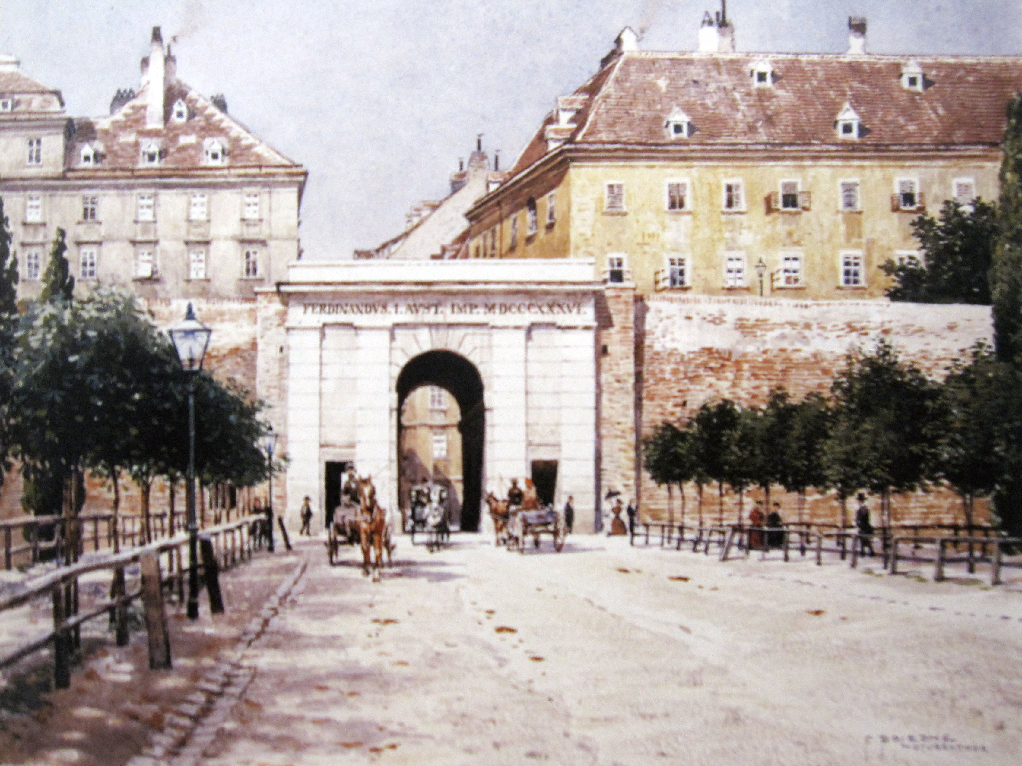 Stubentor